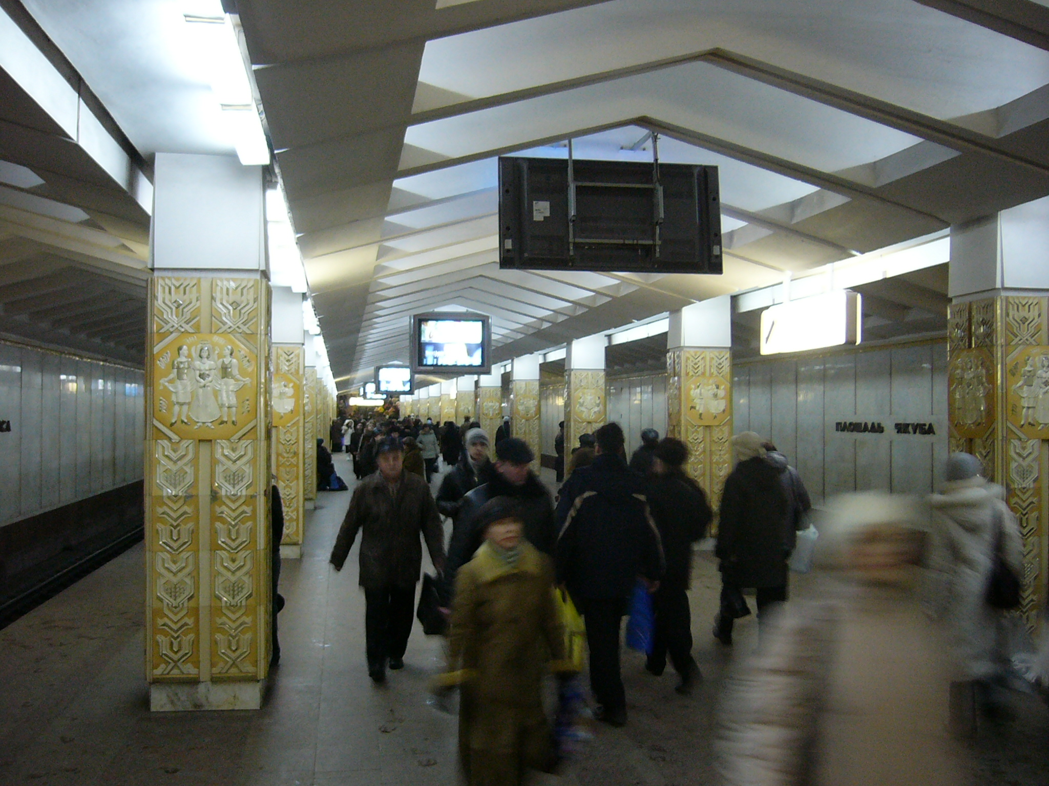 Metro station Ploshad Yakuba Kolasa (Площадь Якуба Коласа) Minsk Photo by Redline